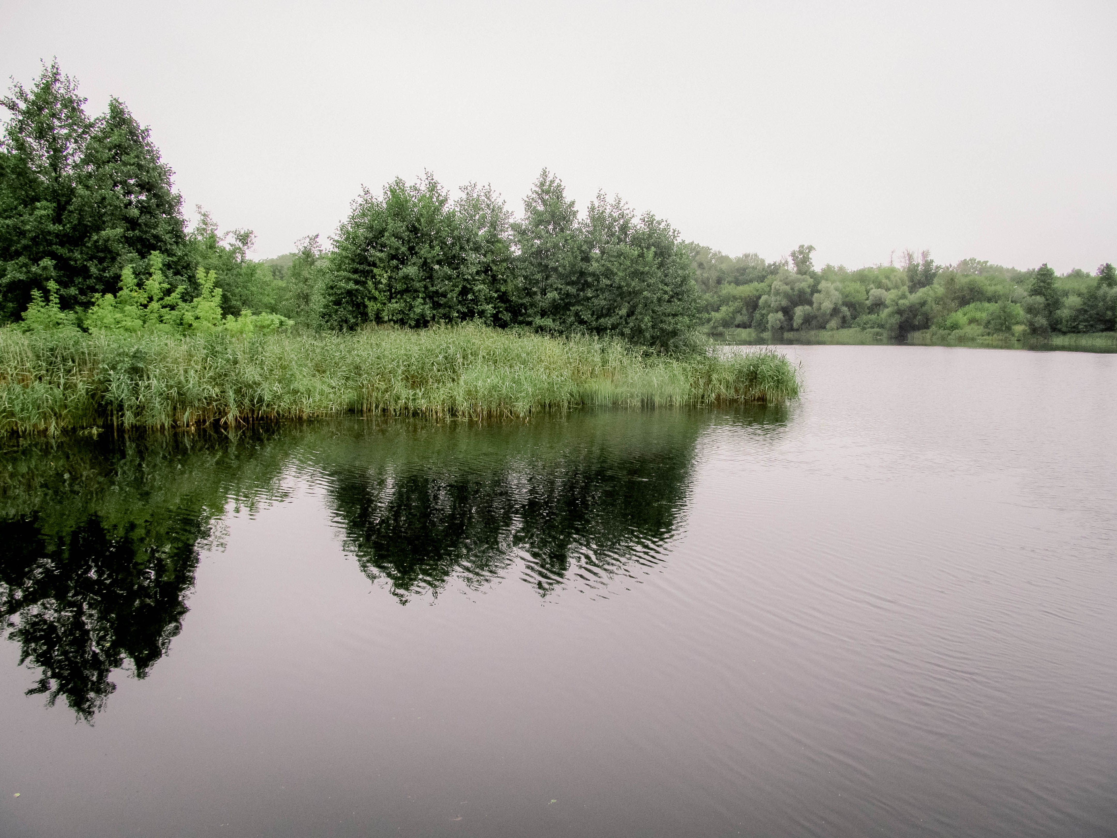 Река Колпь в Красной Горбатке, владимирская область